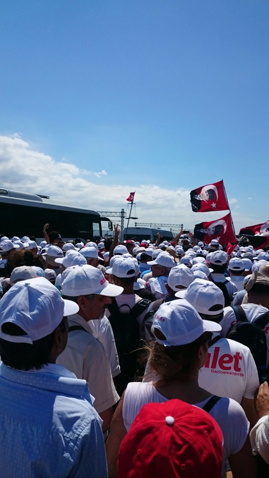 Adalet yürüyüşü, Cumhuriyet Halk Partisi Genel Başkanı Kemal Kılıçdaroğlu'nun Ankara'dan İstanbul'a kadar adalet talebiyle yürümesi olayıdır.